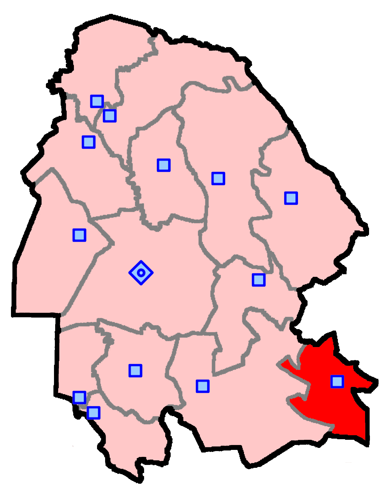 حوزهٔ انتخاباتی بهبهان برای انتخابات مجلس شورای اسلامی